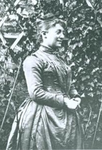 La mycologue belge, Mariette Rousseau (1850-1926).